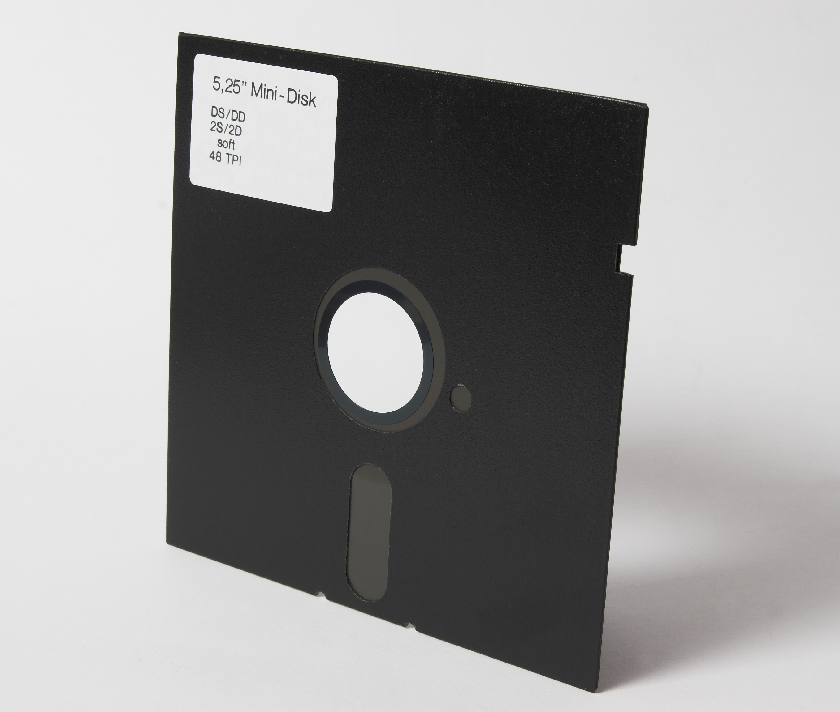 5.25" Diskette without sleeve.